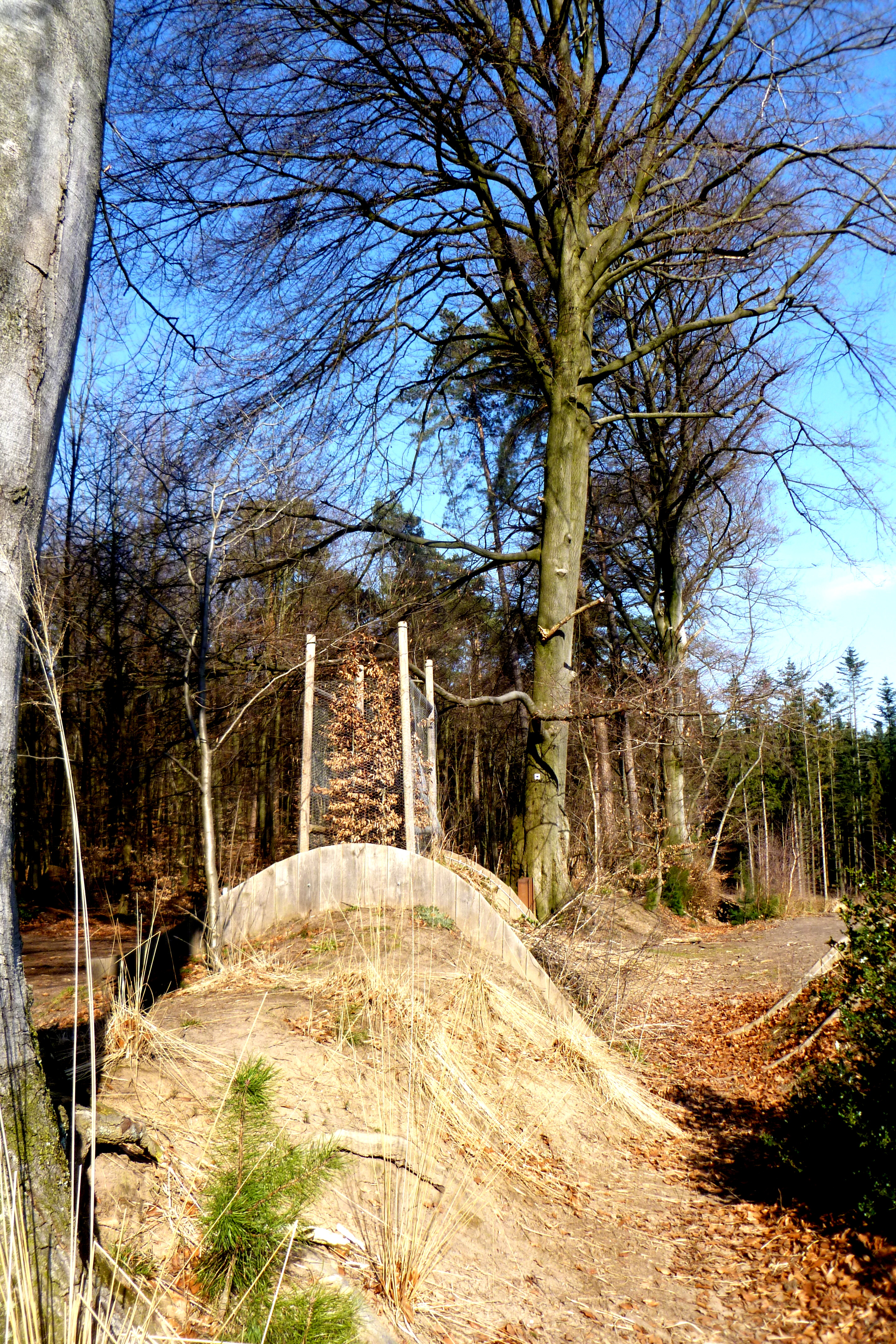 Bodendenkmal Äußerer Landgraben Aachen - Nähe Klausbergweg